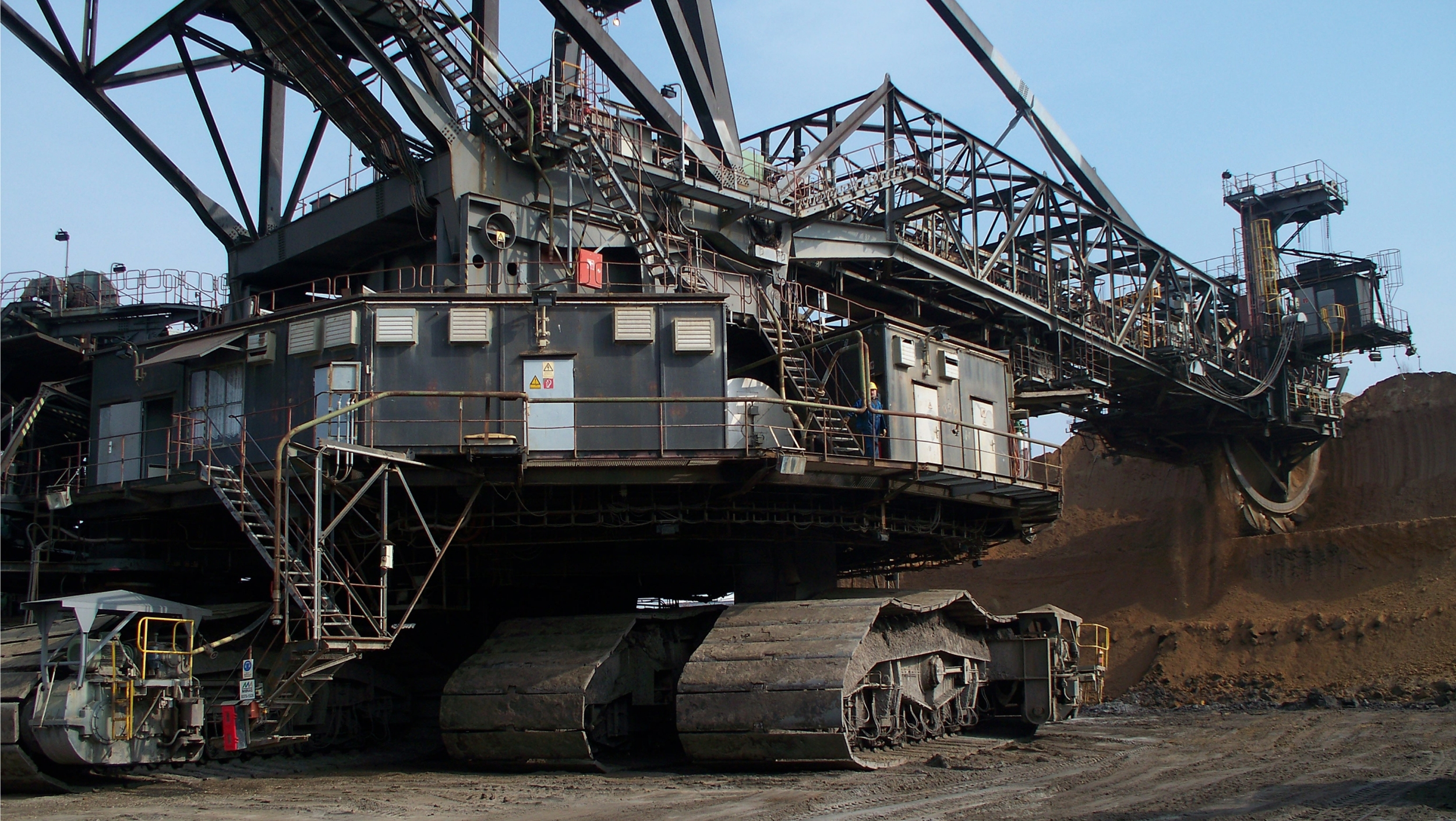 Ein Abraum-Schaufelradbagger im Braunkohle-Tagebau Schleenhain .